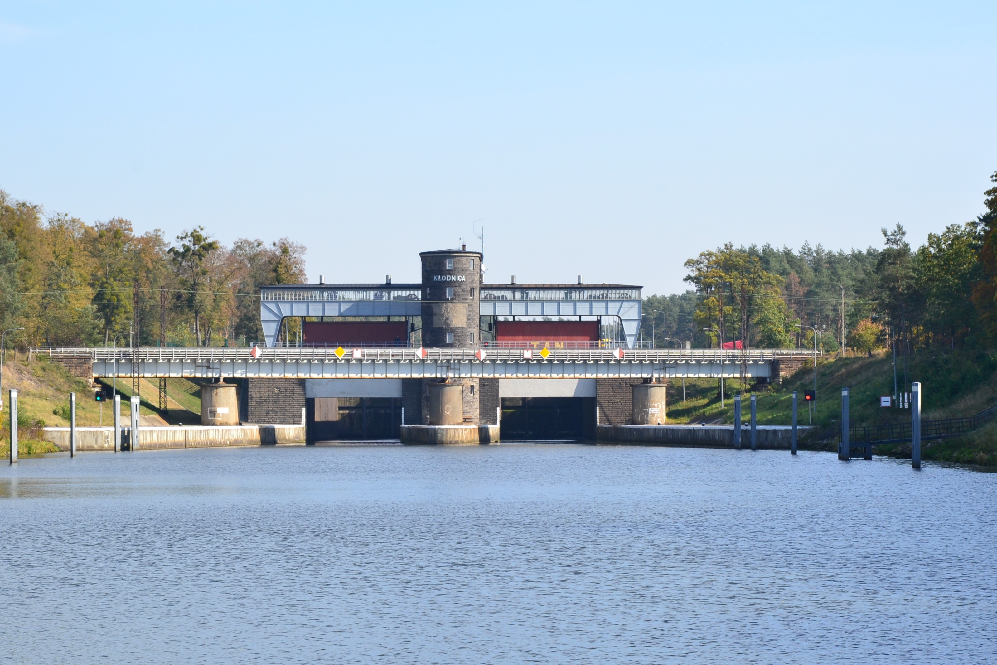 Śluza Kłodnica na Kanale Gliwickim od strony dolnej wody.